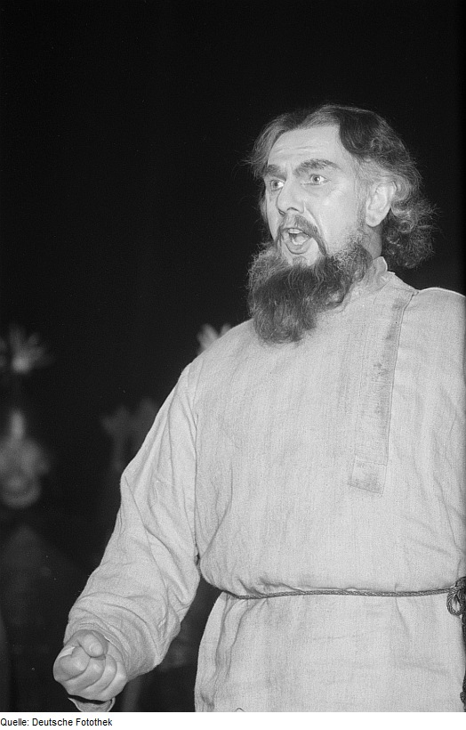 Original image description from the Deutsche Fotothek Portrait von Hans Krämer in der Rolle des Iwan Ssussanin bei der Premiere der Oper "Iwan Ssussanin" ("Ein Leben für den Zaren") von Michail Glinka